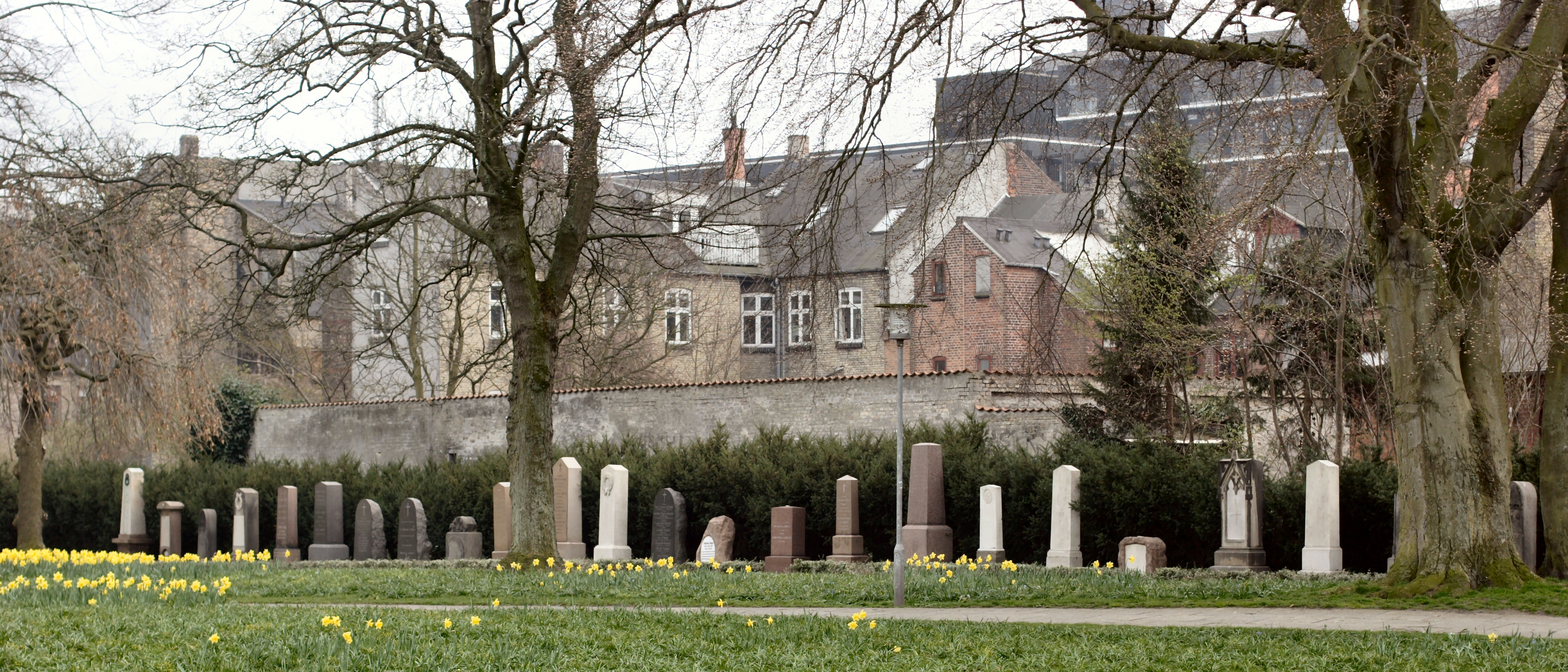 lapidarium i Århus Rådhuspark